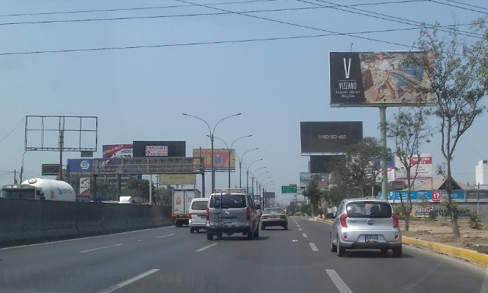 autopista limeña